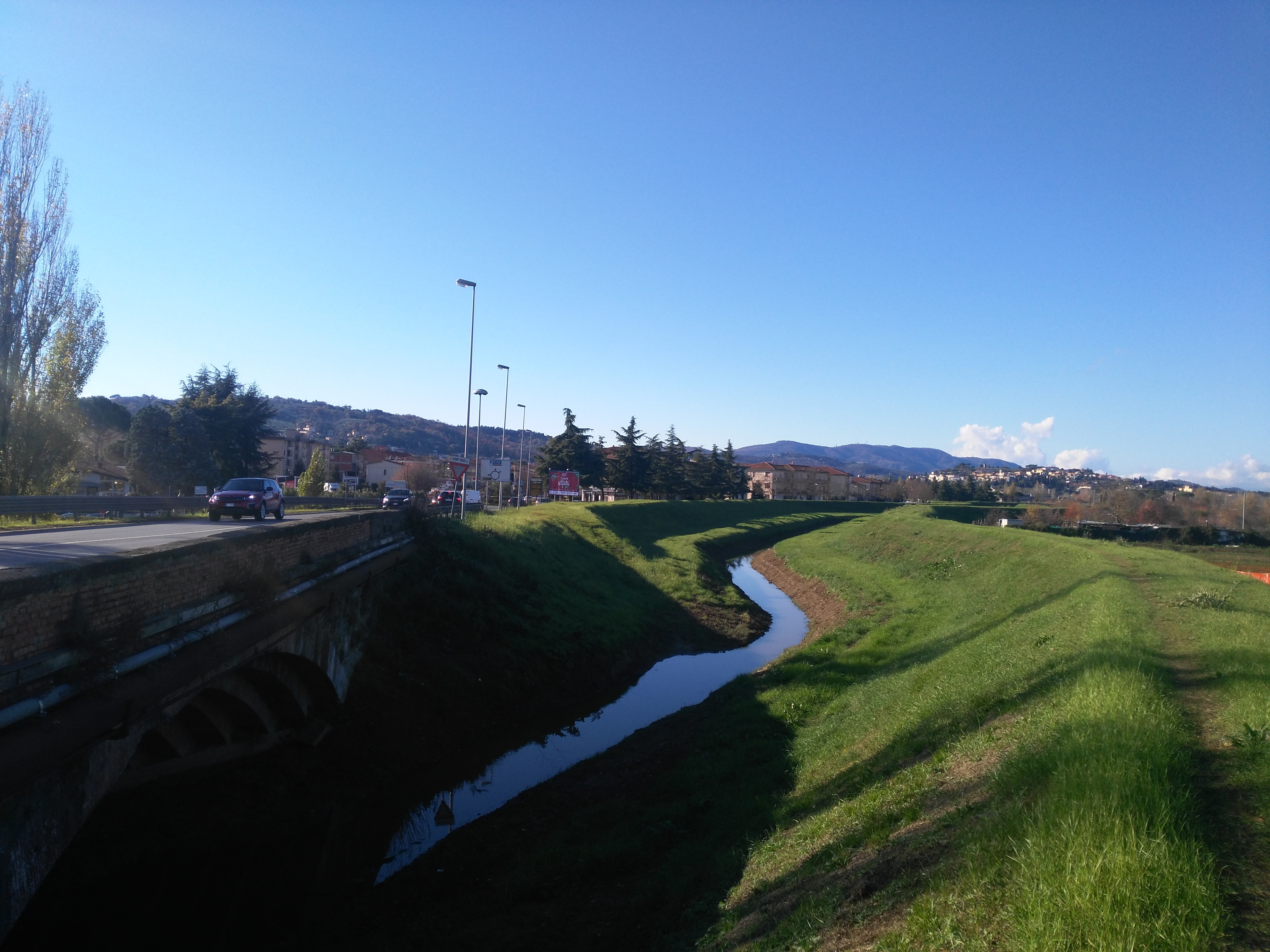 Il torrente Vingone nei pressi di Lastra a Signa e la sua frazione Stagno.